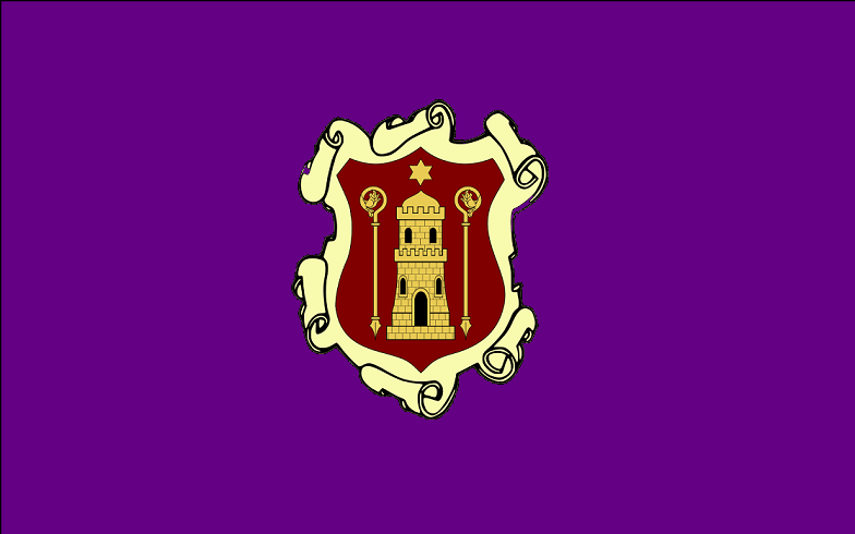 Bandera de Cazorla, en Jaén (España)